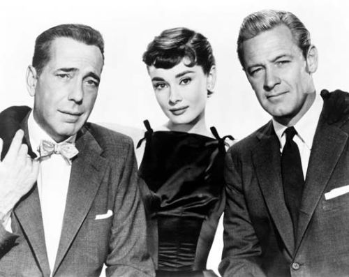 Publicity photo of Humphrey Bogart, Audrey Hepburn & William Holden taken for film Sabrina (1954). See also film still. No copyright notice